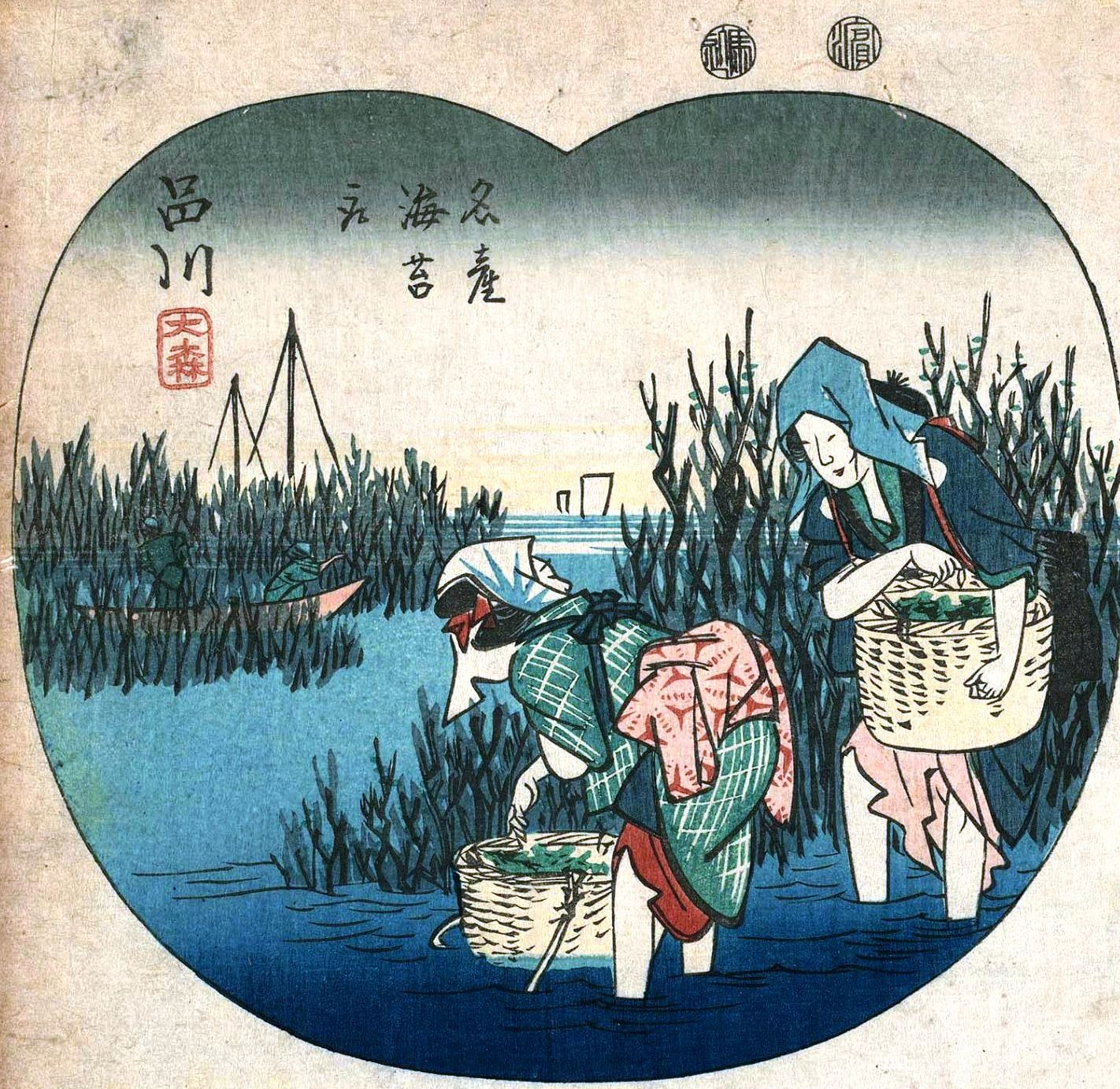 広重 品川大森海苔取り 東海道はりまぜ図絵